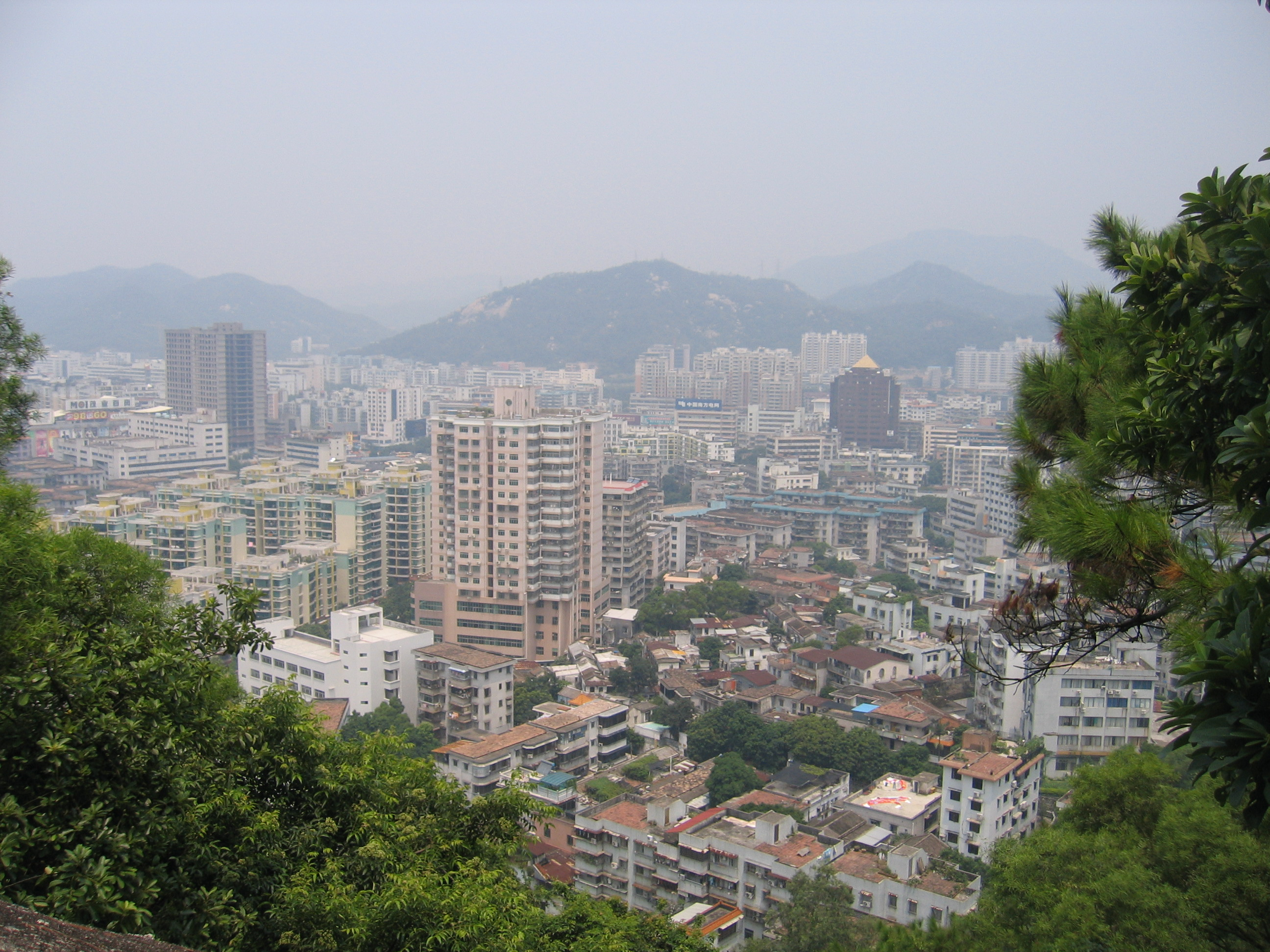 香洲（摄于香山公园）